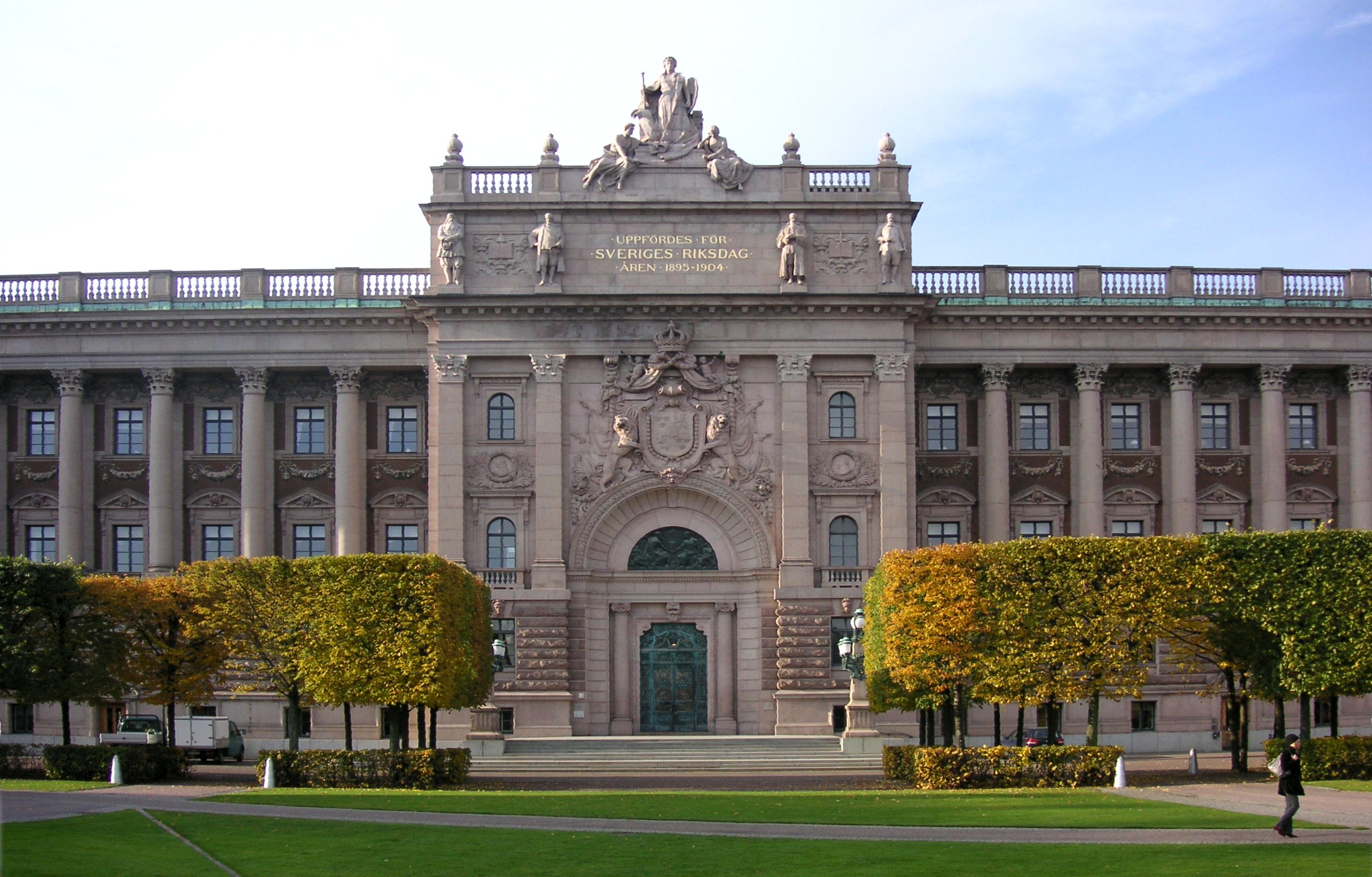 Riksdagshuet i Sockholm, fasad mot öst